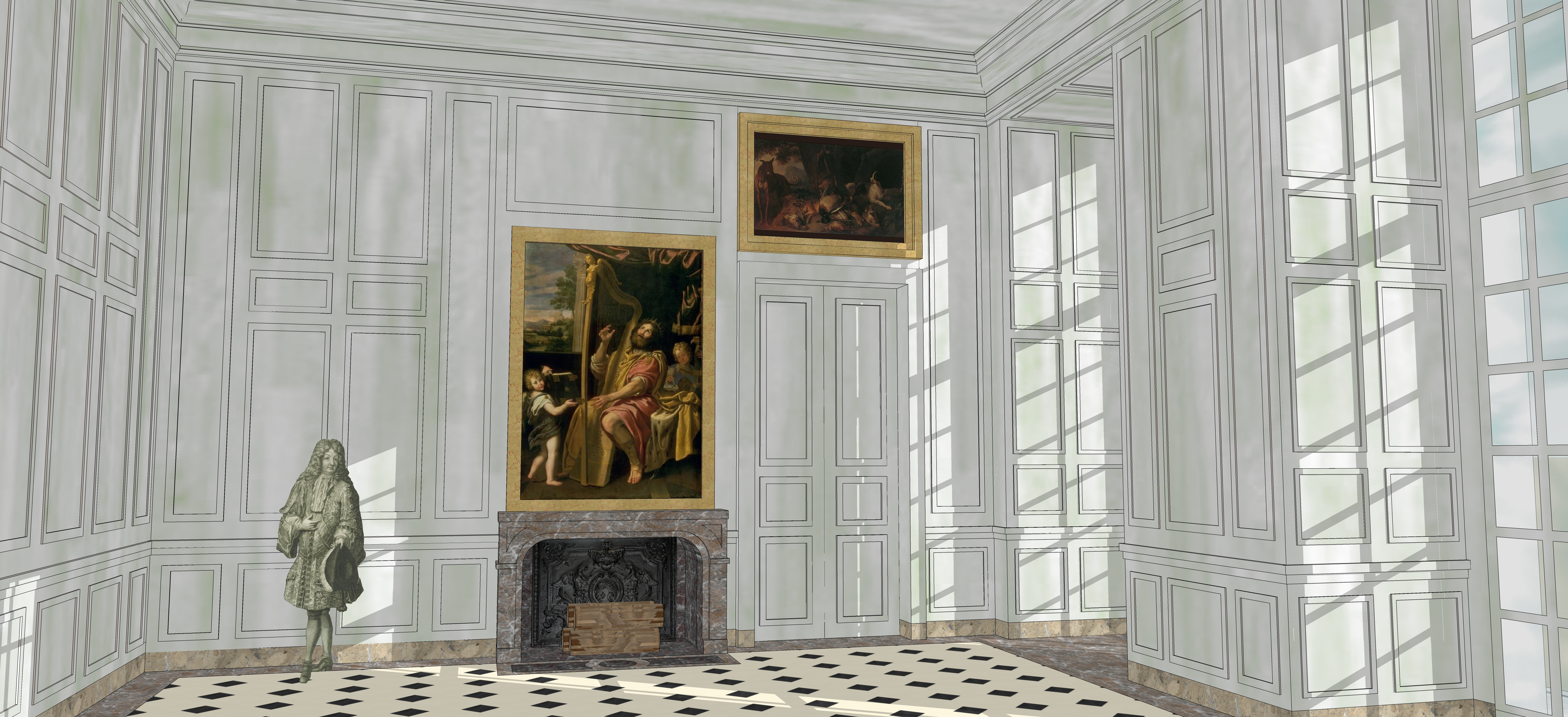 Essai de restitution de la salle des gardes du château-neuf de Meudon, état vers 1709, lors de sa création.